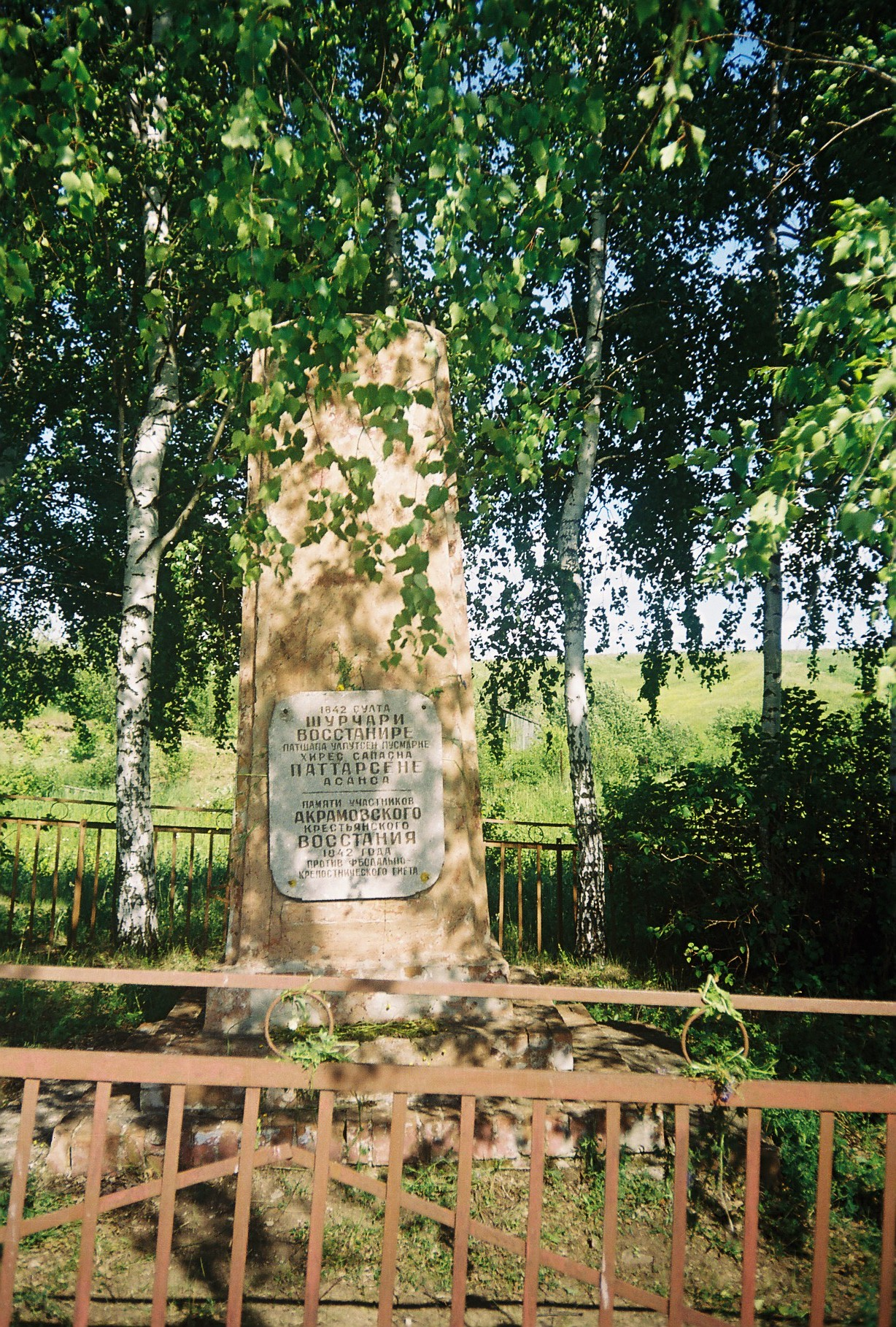 Памятник Акрамовскому восстанию (2001)